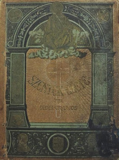 Dedek Crescens Lajos: Szentek élete (1900)